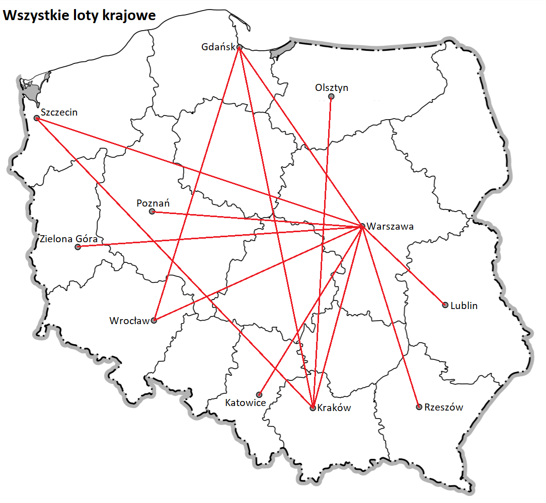 Mapa Polski - loty krajowe 2019